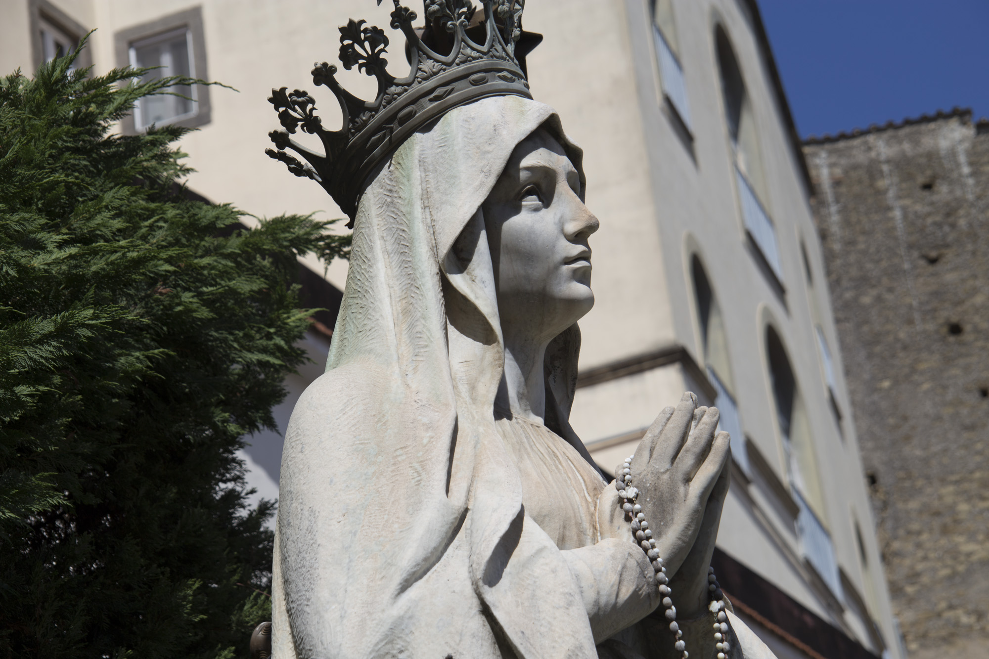 Particolare della statua sulla cima della scalinata della Chiesa